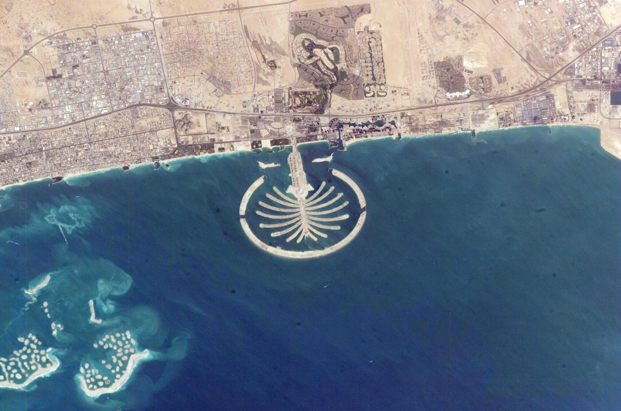 In Bau befindliche The World und The Palm in Dubai aus dem Orbit.